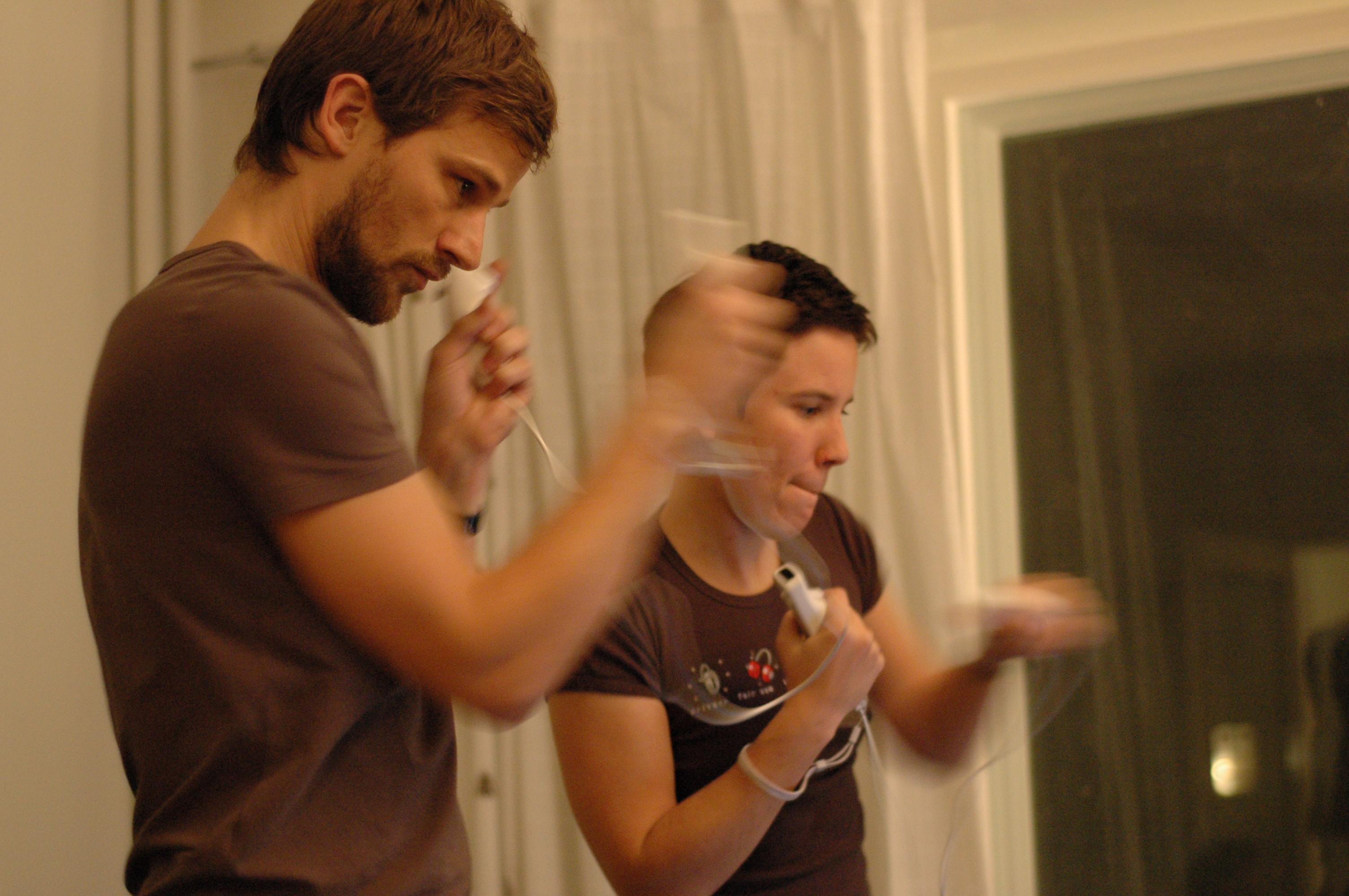 Punches